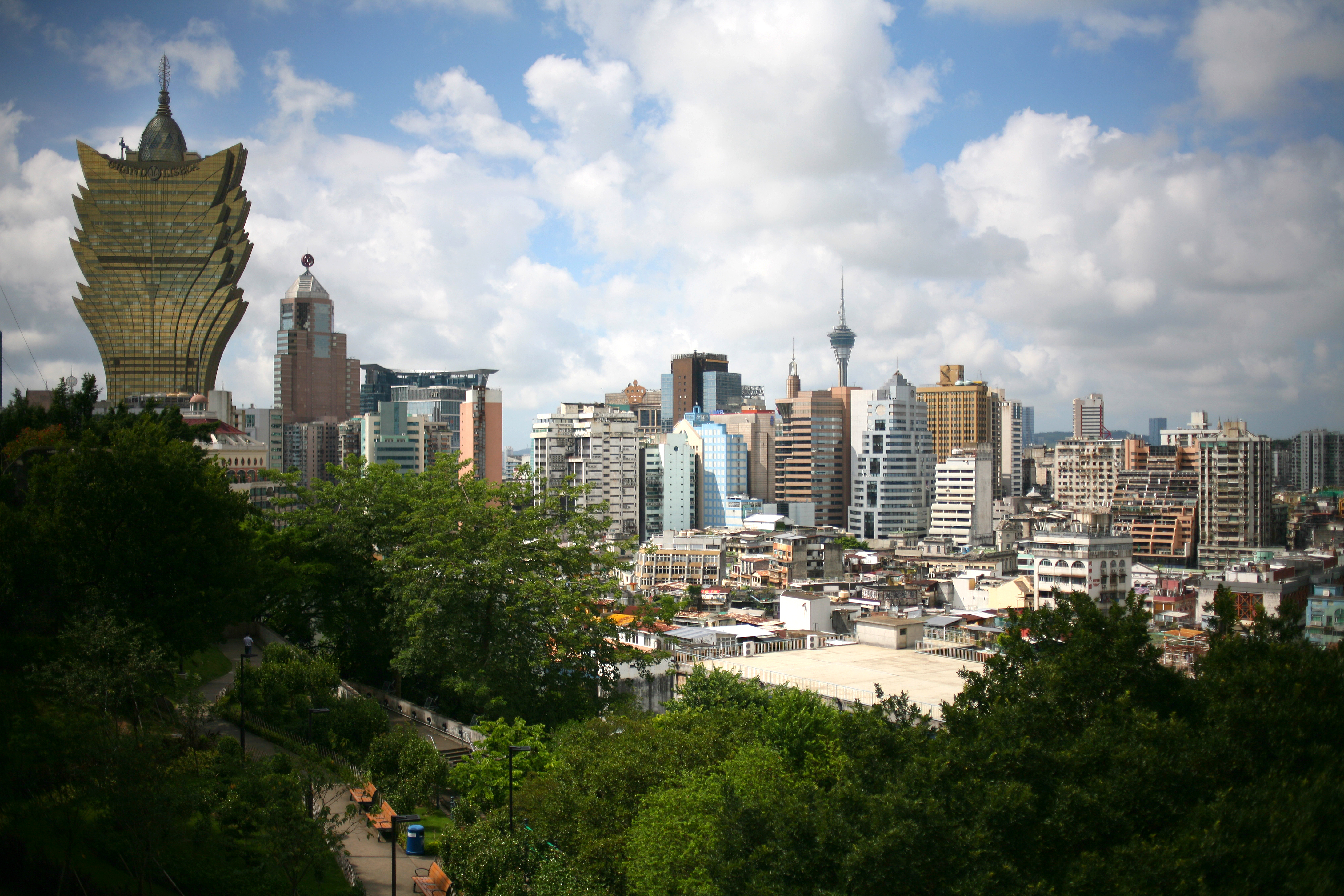 Veduta del centro di Macao dalla Fortaleza do Monte